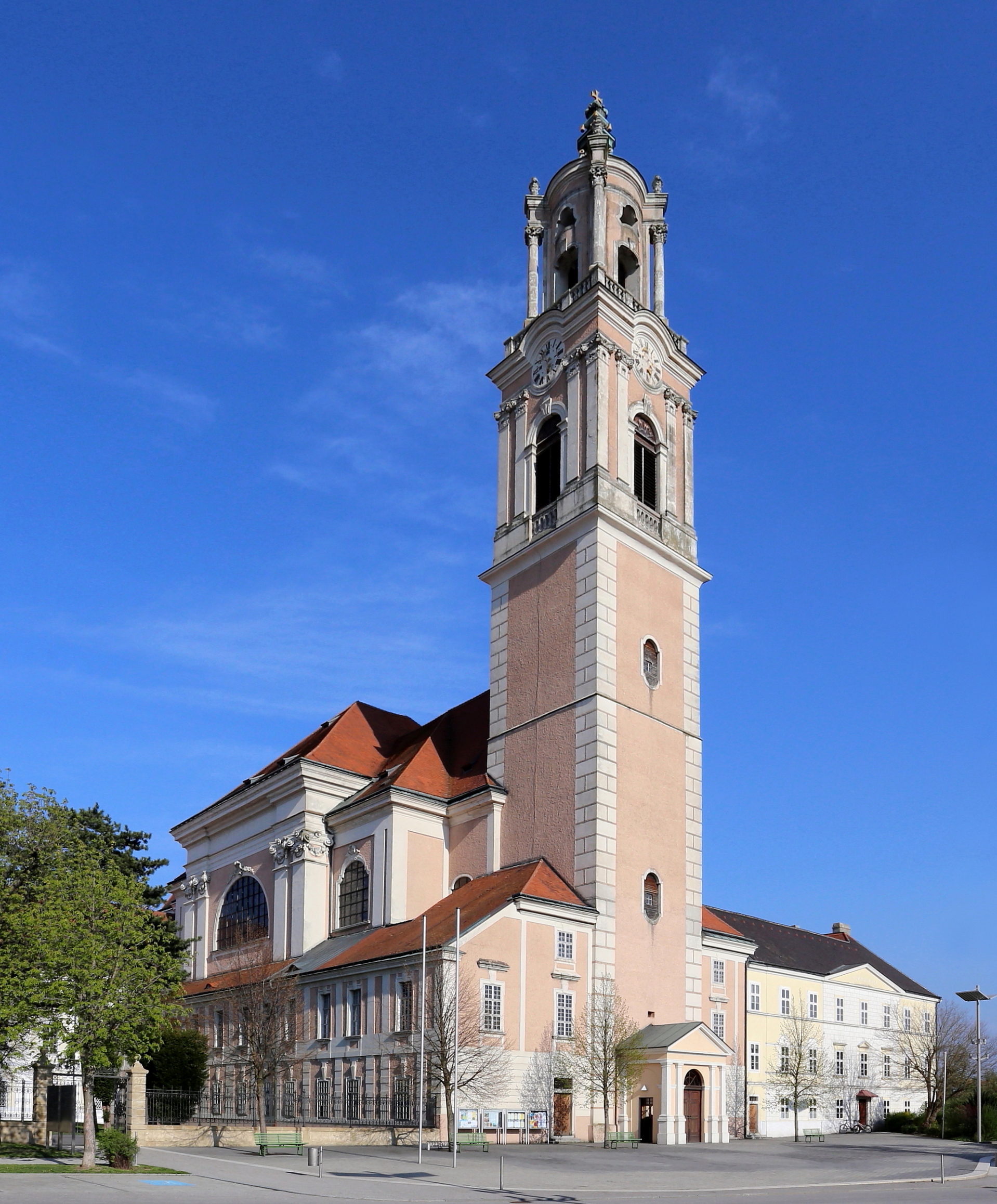 Stifts- und Pfarrkirche hll. Georg und Stefan in der niederösterreichischen Stadt Herzogenburg. Das Langhaus ist ein barocker abgestufter Kuppelbau. Der markante und barockisierte Turm ist bis etwa der Firsthöhe des Langhauses mittelalterlich.